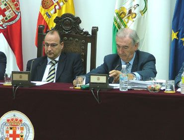 Pleno del Ayuntamiento de Almería